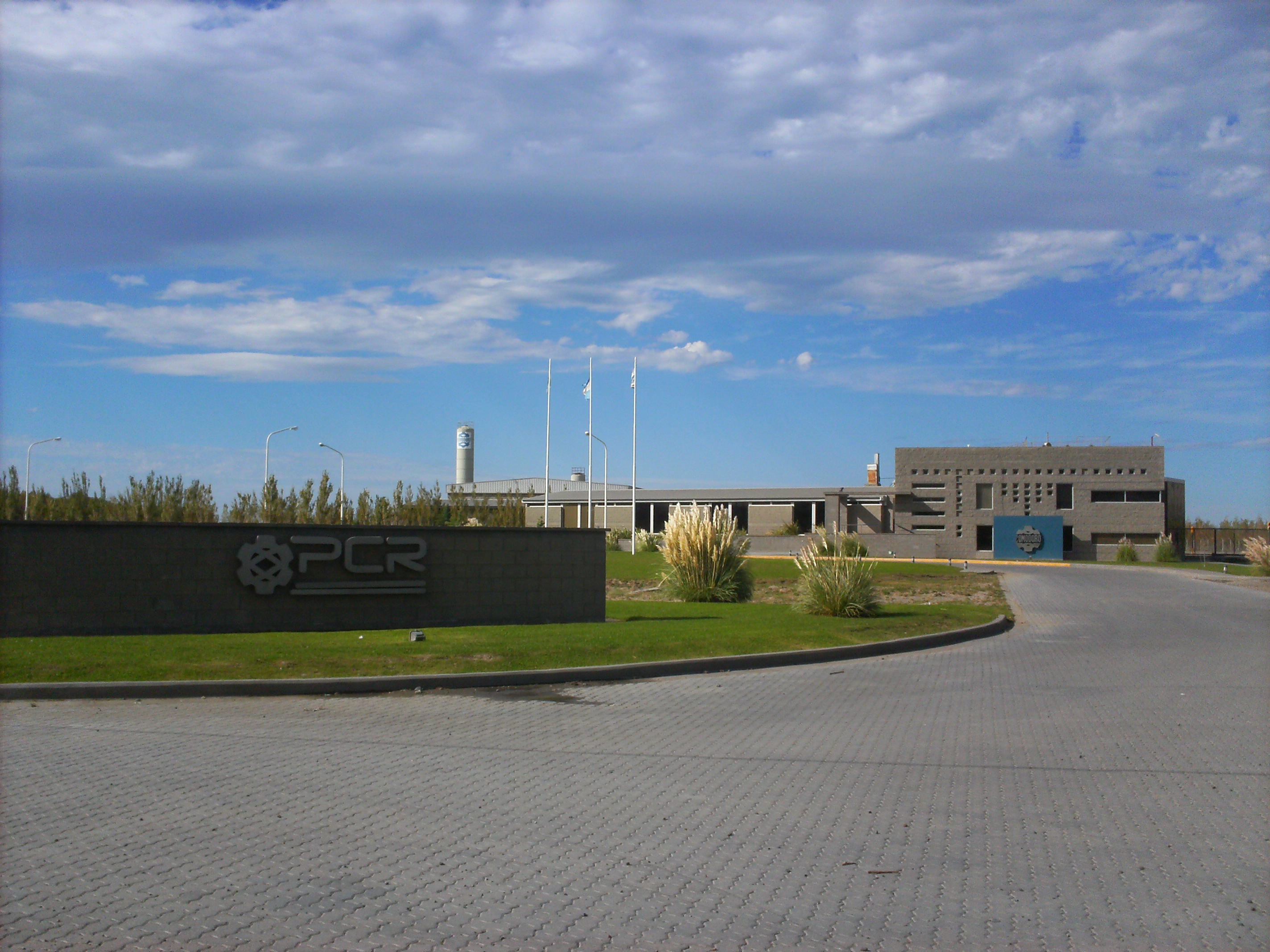 la plamta cementera en km8